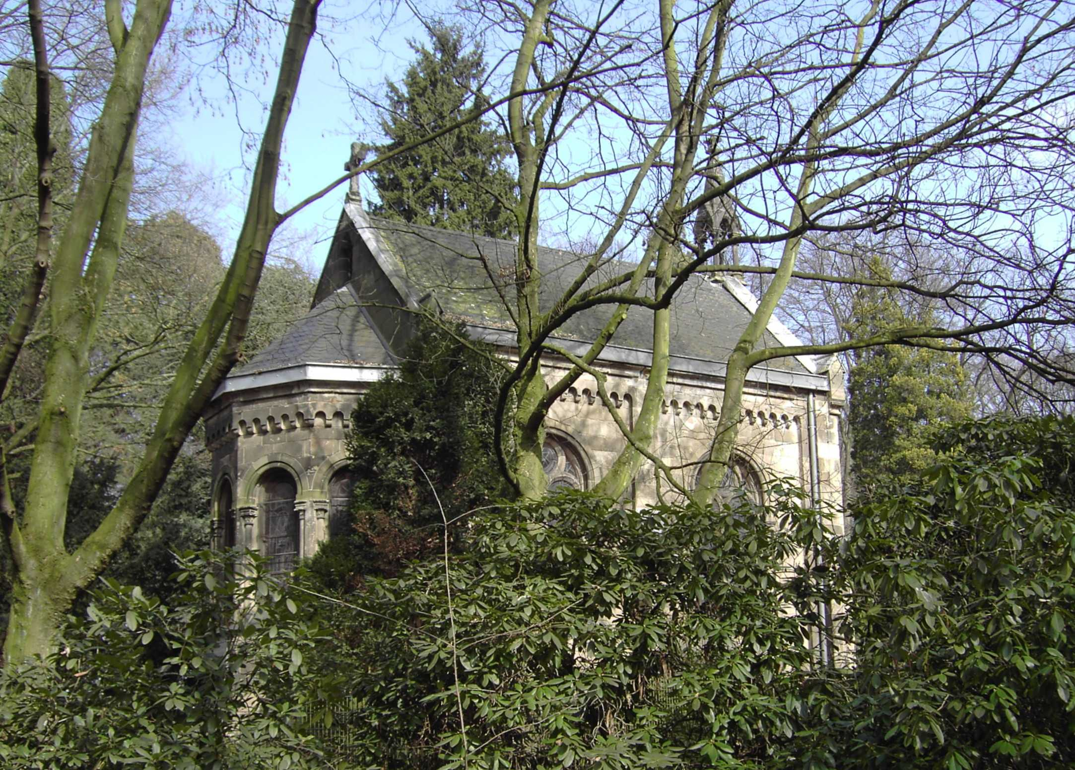 Kapelle (1878-79) im Lantz'schen Park, Düsseldorf